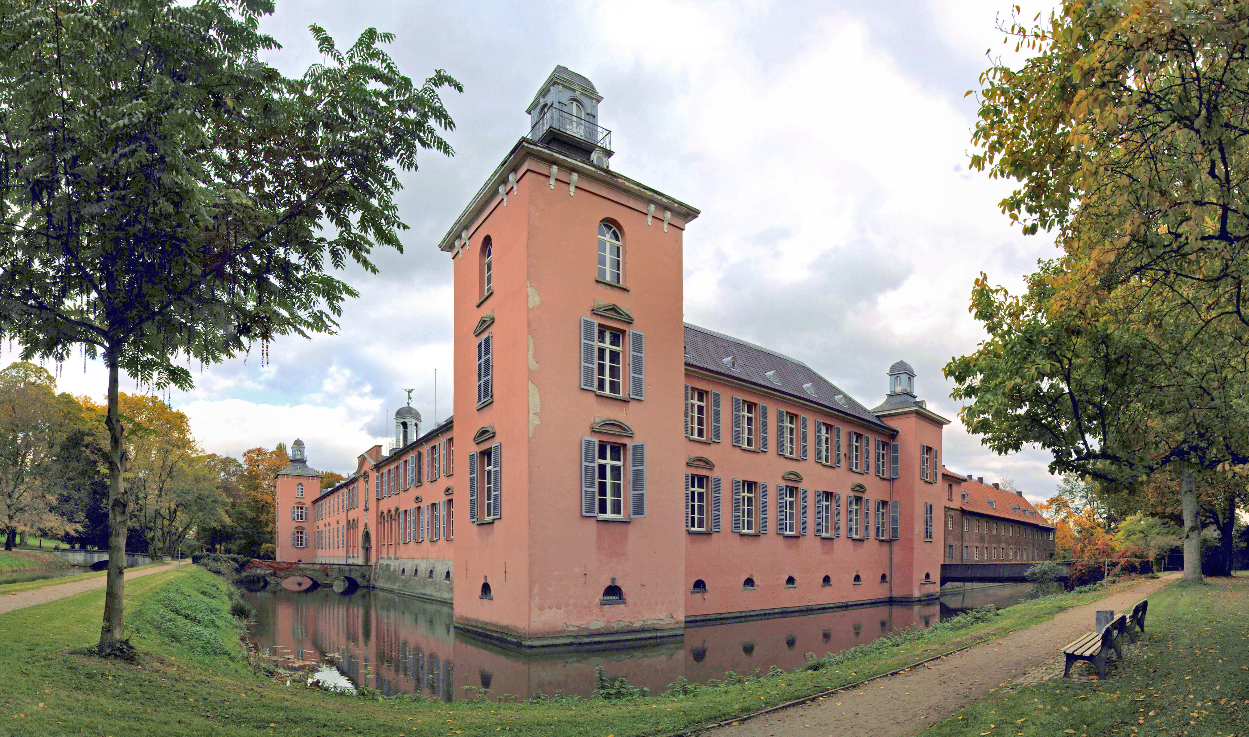 Schloss Kalkum in Düsseldorf, Ansicht von Südwesten This image shows a heritage building in Germany, located in the North Rhine-Westphalian city Düsseldorf (no. 520). This photograph was taken with a Nikon D3000.